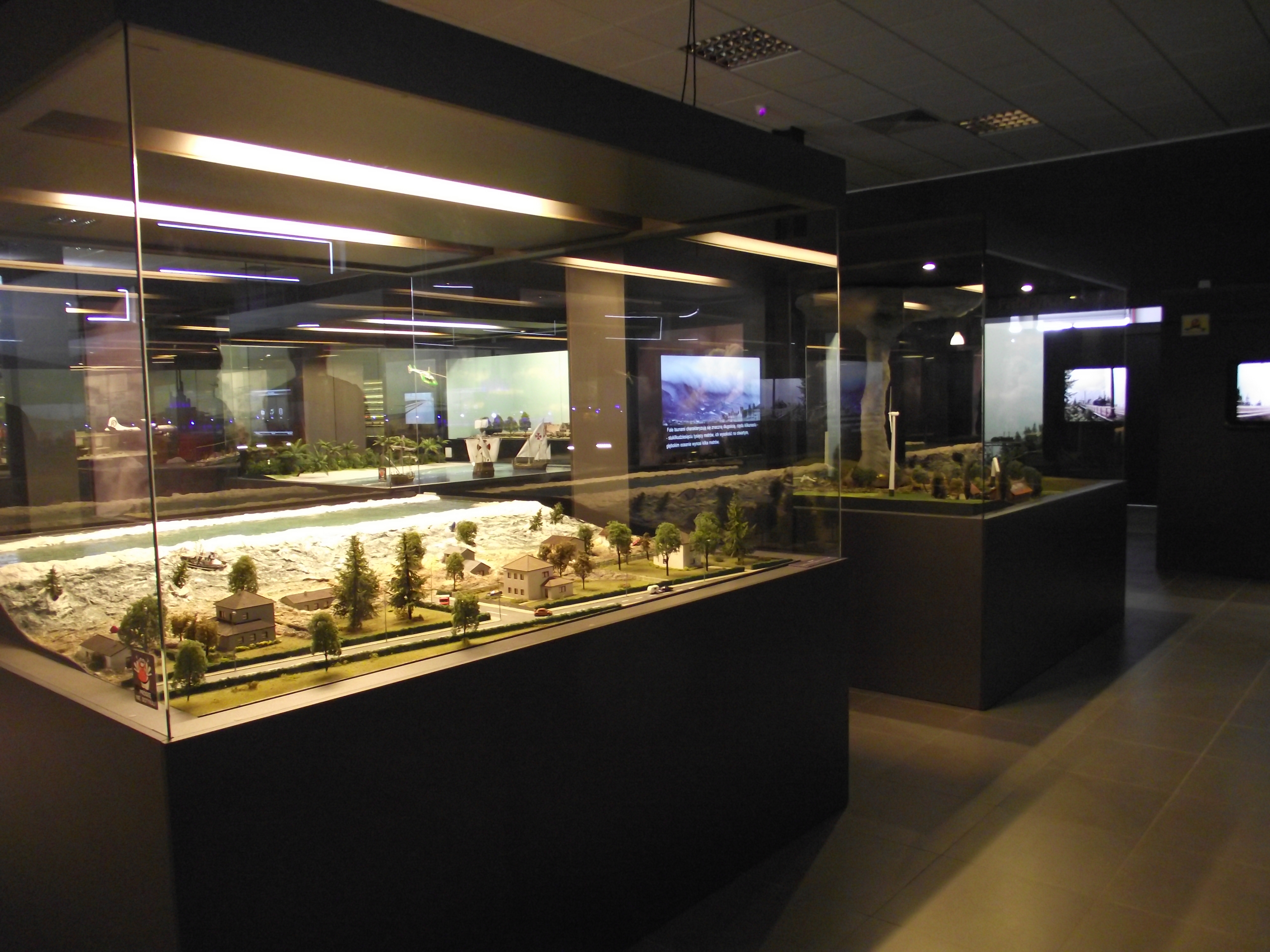 tsunami